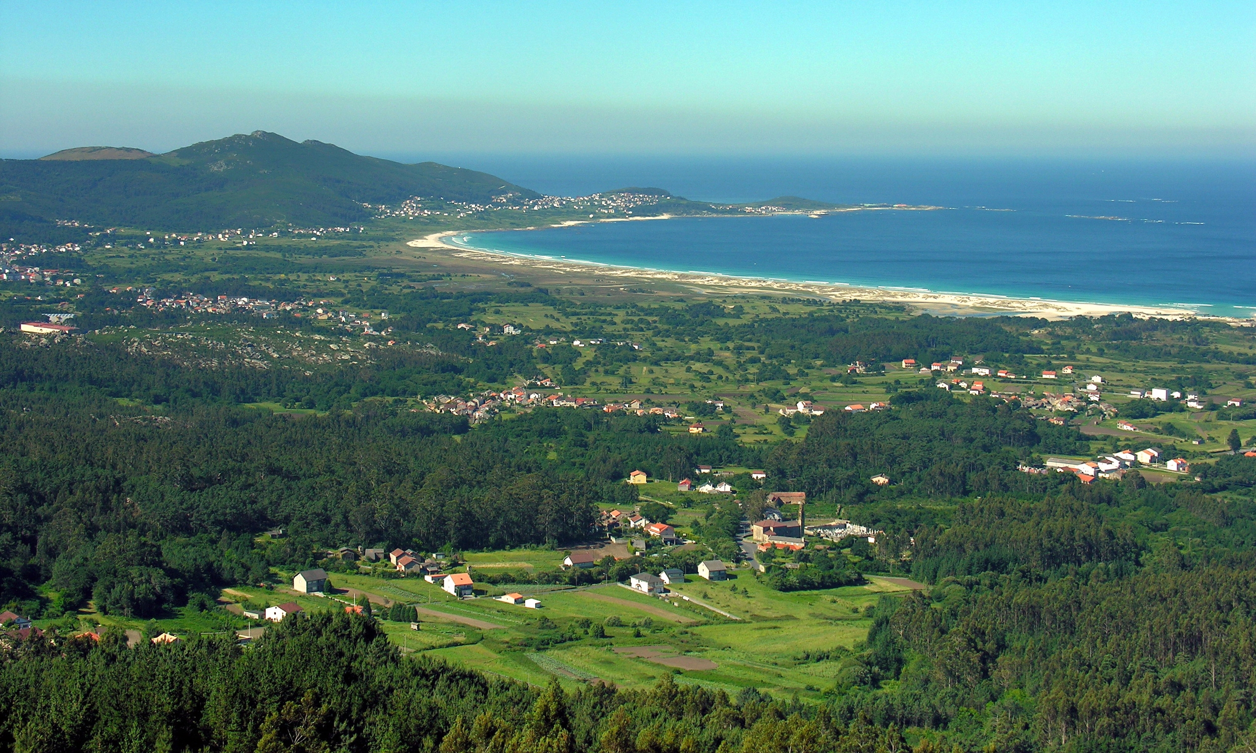 Praia de Carnota (A Coruña). Foto tirada cunha Nikon E8800. Self made